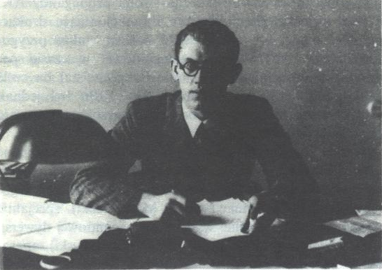 Jerzy Rutkowski